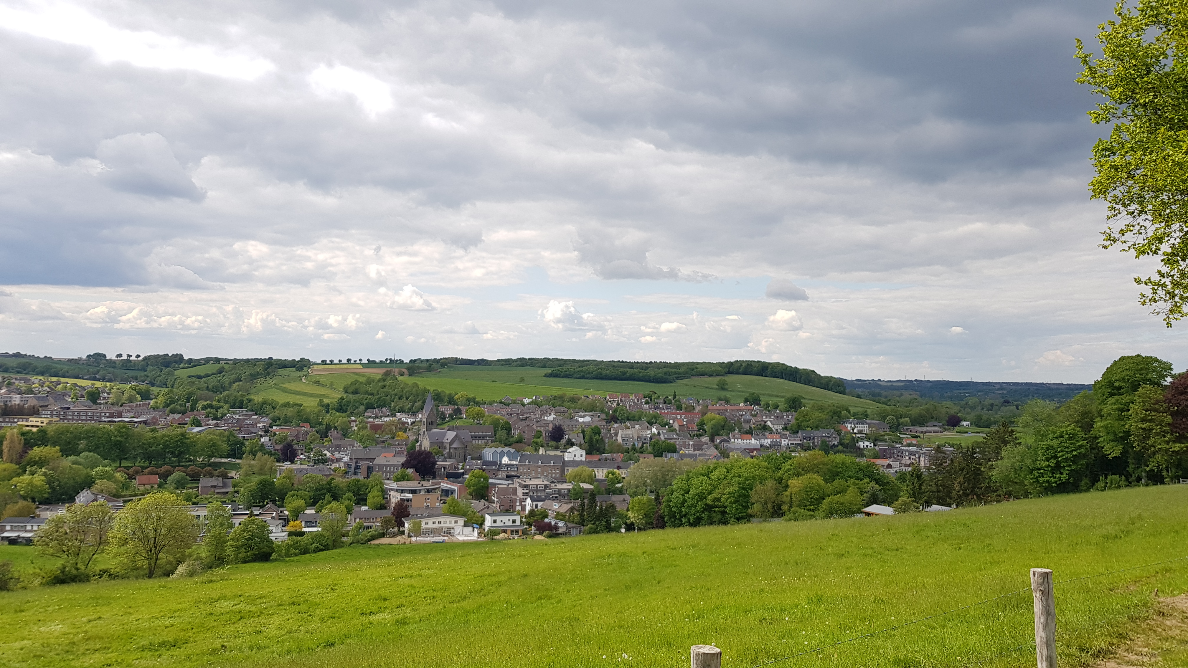 Dolsberg bij Gulpen, Nederland